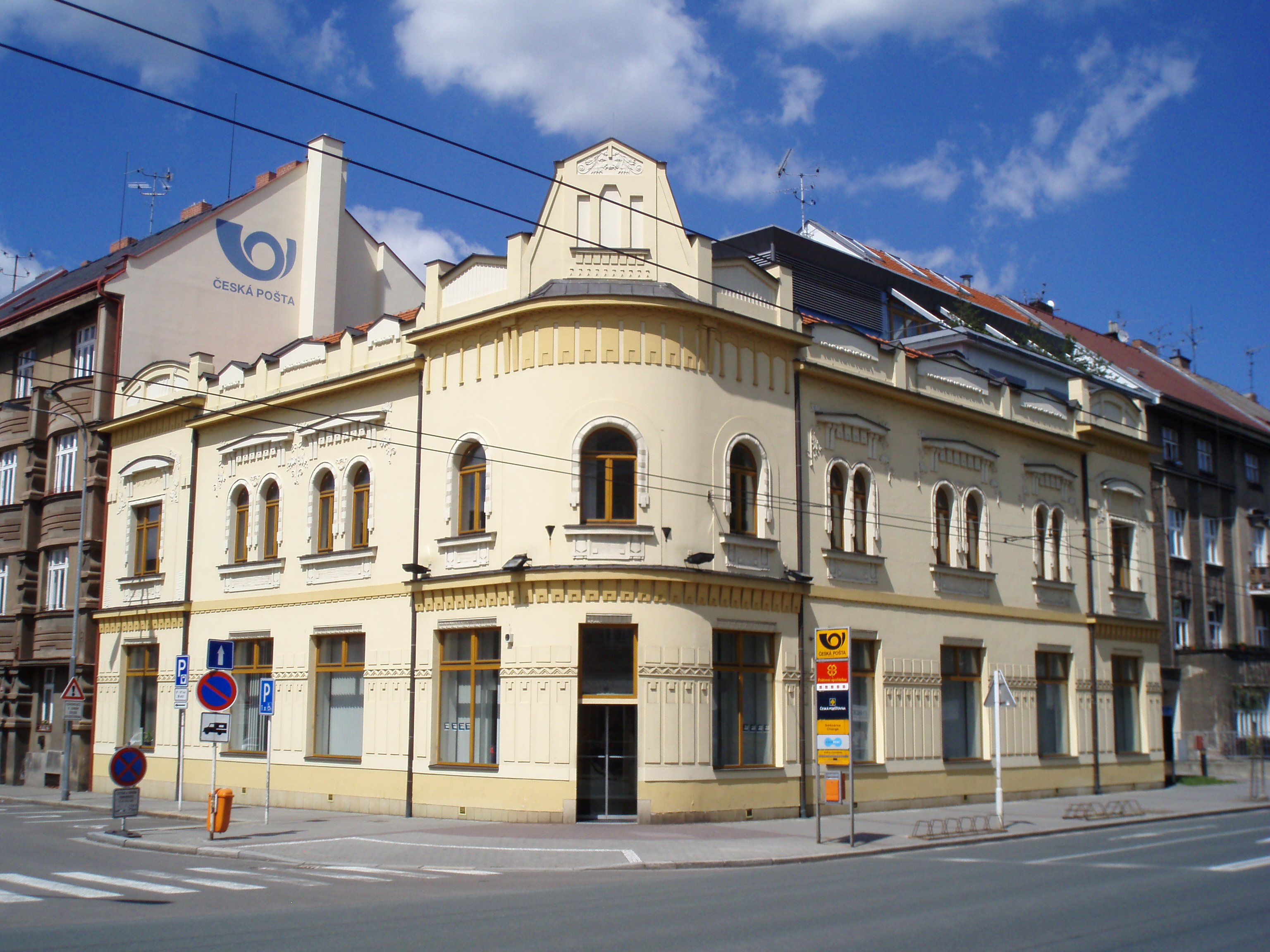 Pošta Hradec Králové 3, Pospíšilova 215/11a.